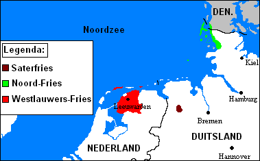 eigen kaart